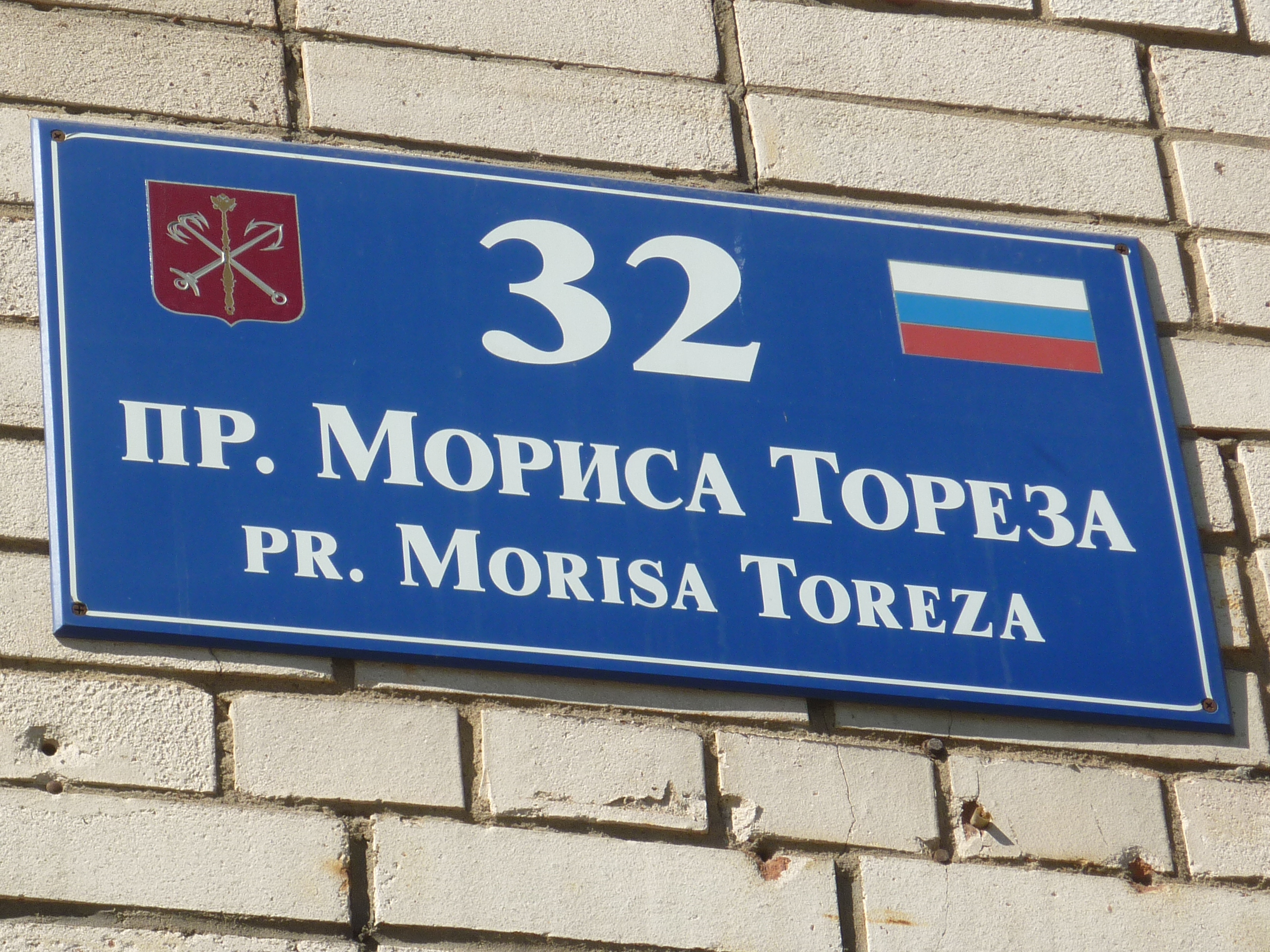 Prospect Morisa Toreza 32